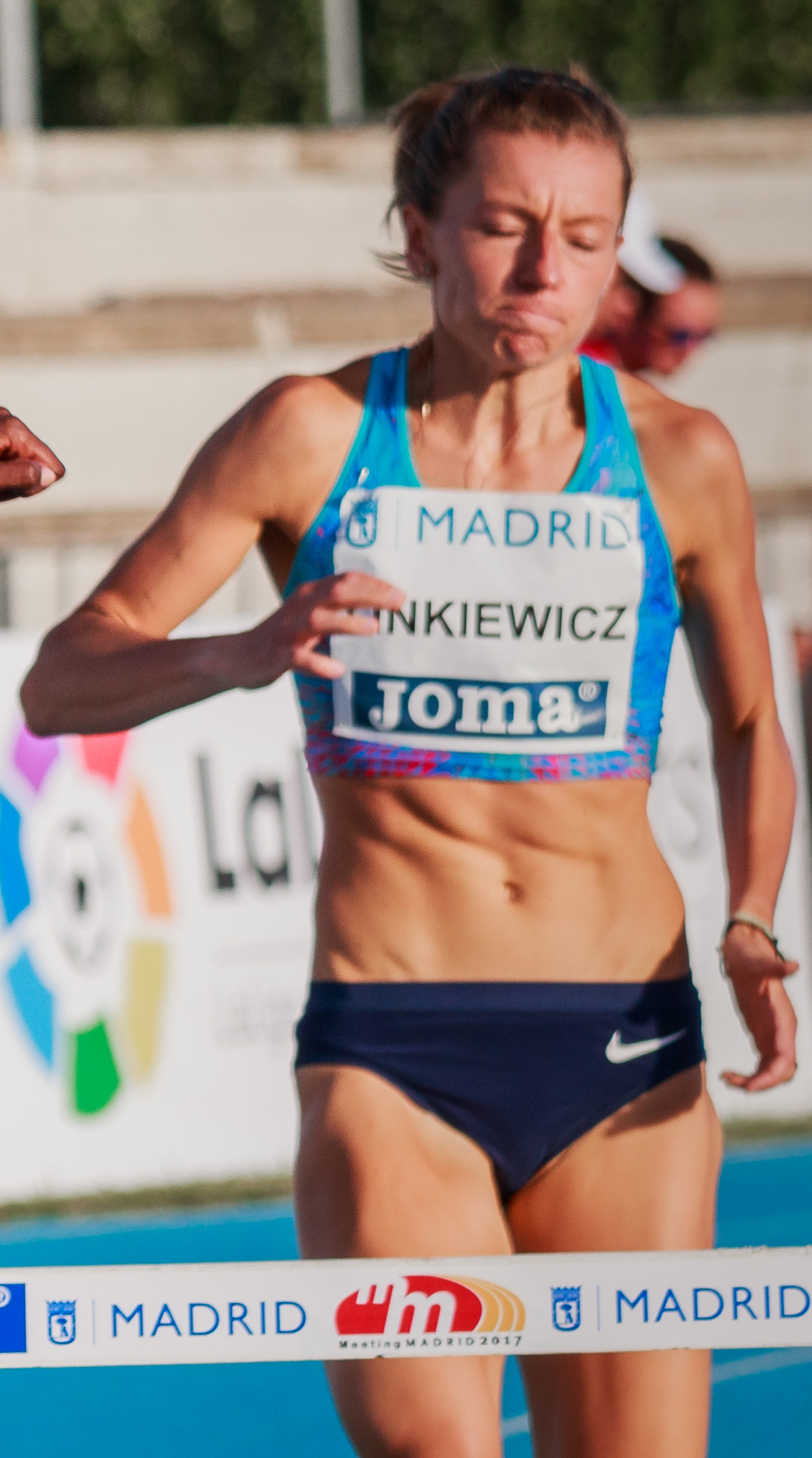 Joanna Linkiewicz (POL). 400m vallas. IAAF World Challenge. Meeting Madrid 2017. Moratalaz, Madrid.